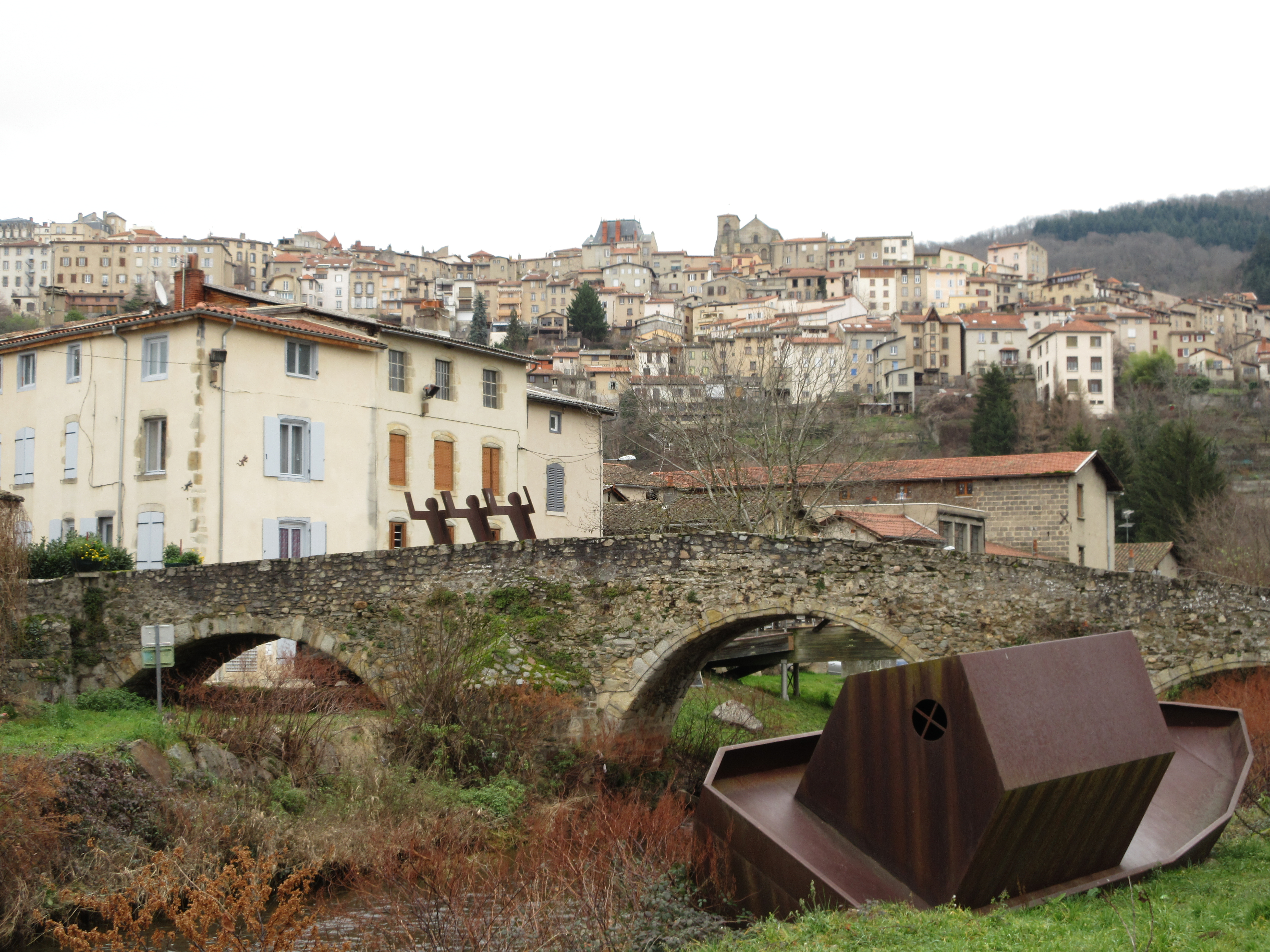 Pont du Moutier à Thiers